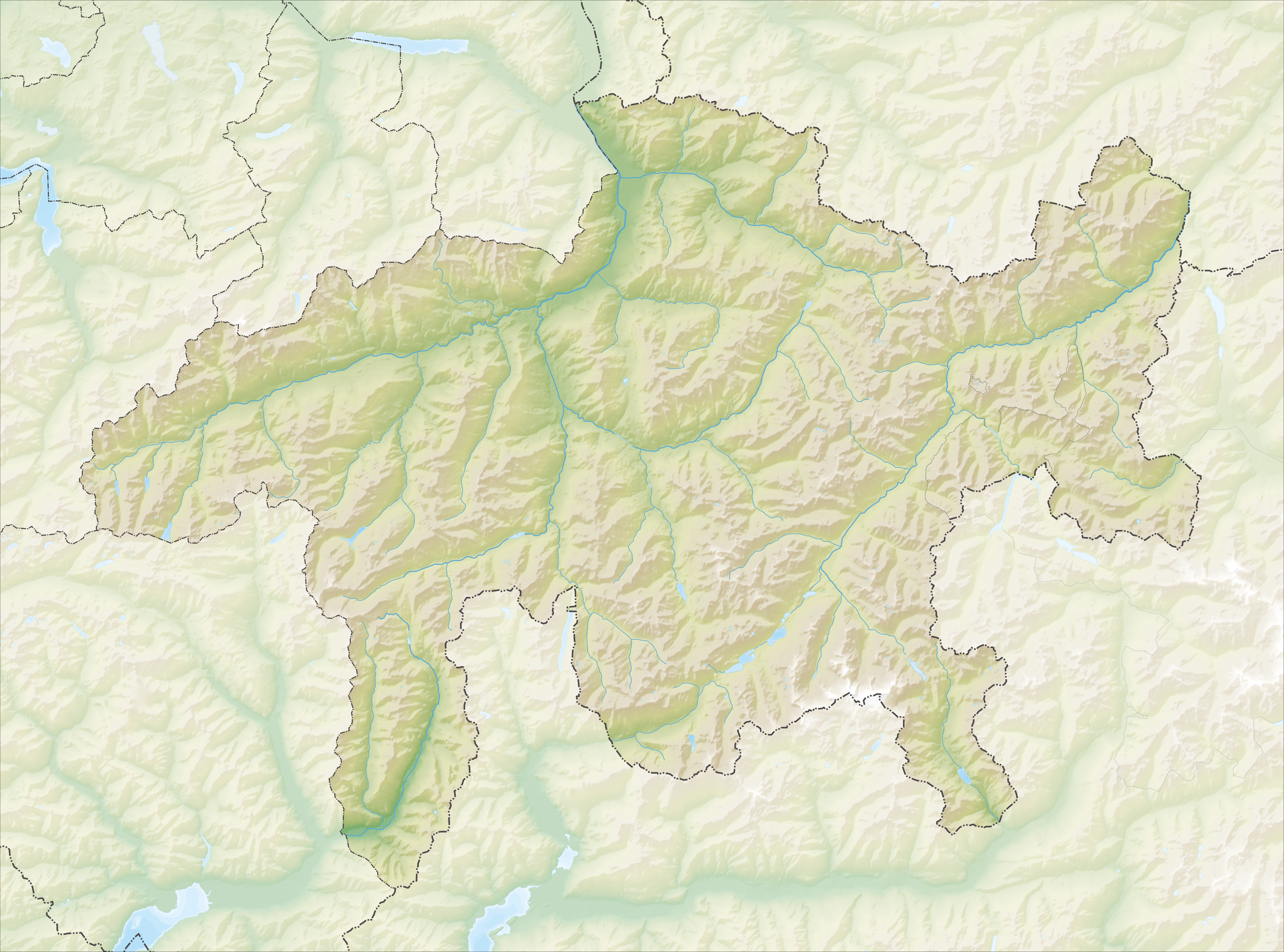 Reliefkarte des Kantons Graubünden Topographischer Hintergrund: NASA Shuttle Radar Topography Mission (public domain). SRTM3 v.2.